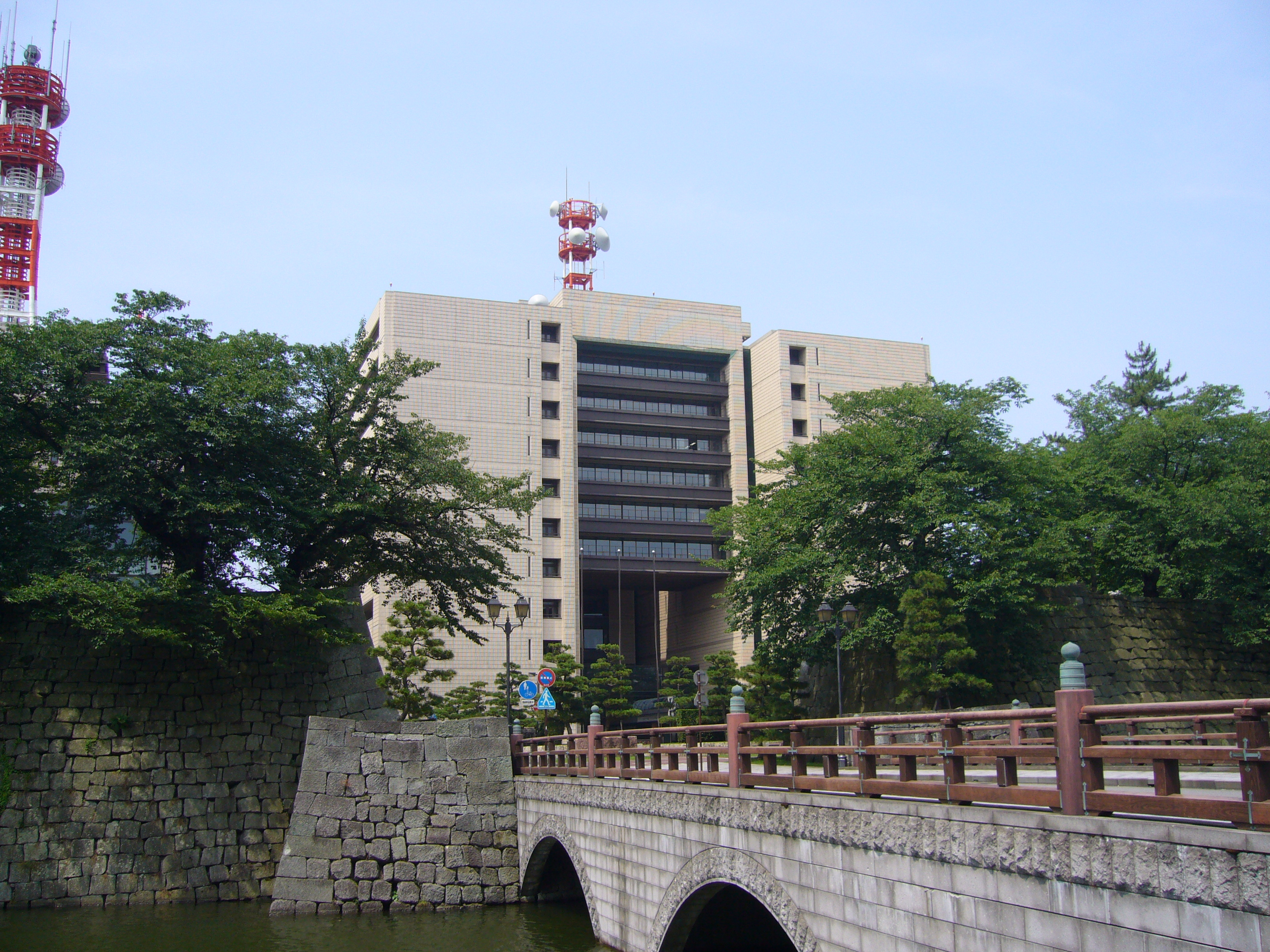 Fukui Prefectural Office in Fukui, Japan 福井県庁舎（福井県福井市） ※手前は御本城橋